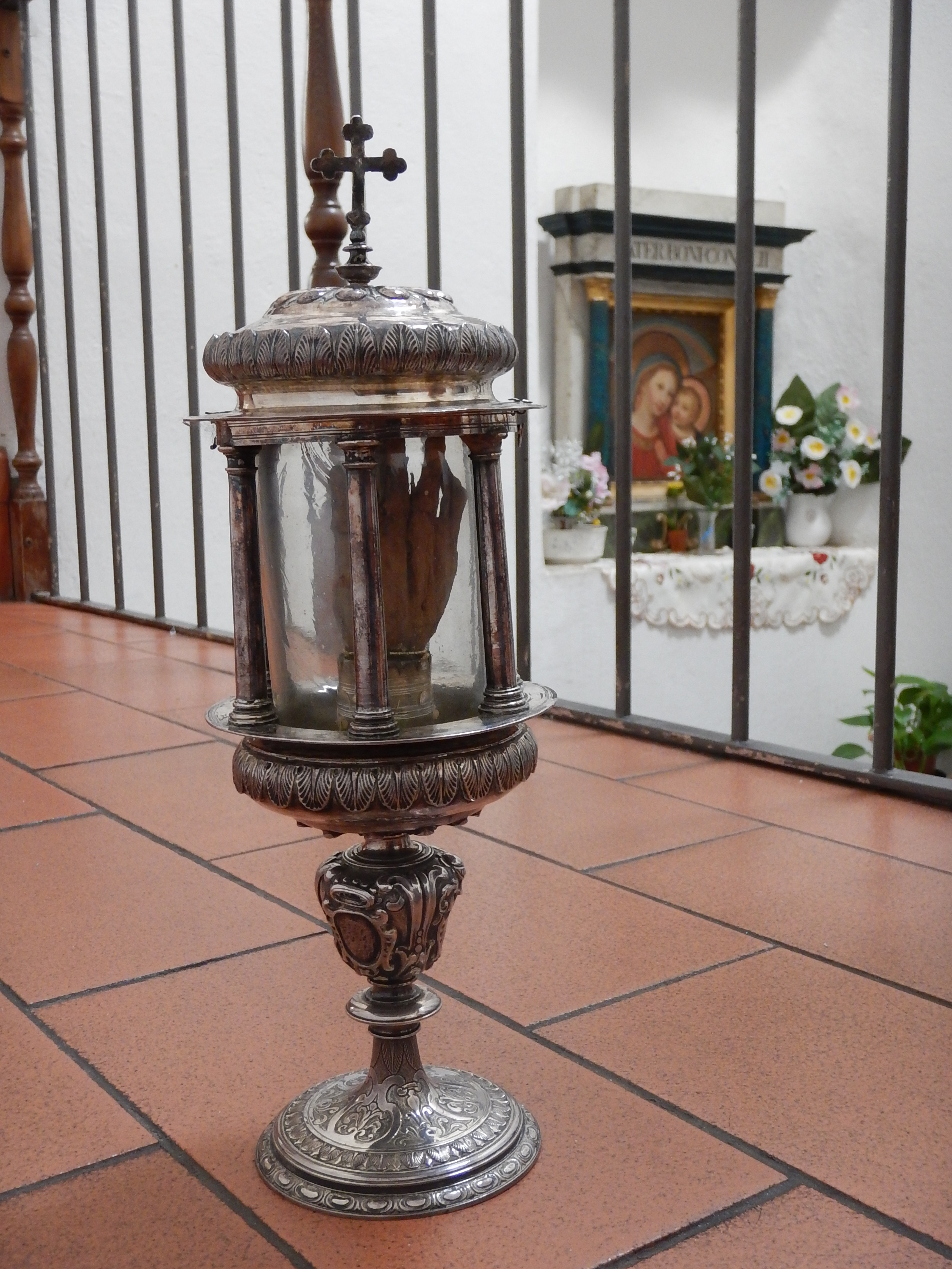 Mano di San Quirico a Legnaia, reliquia custodita nella chiesa e contenuta in una pisside a tempietto d'argento; sullo sfondo, il dipinto della Madre del Buon Consiglio